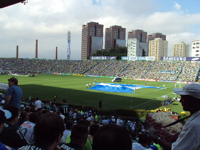 Vista do Estádio Palestra Itália em dia de jogo do Palmeiras